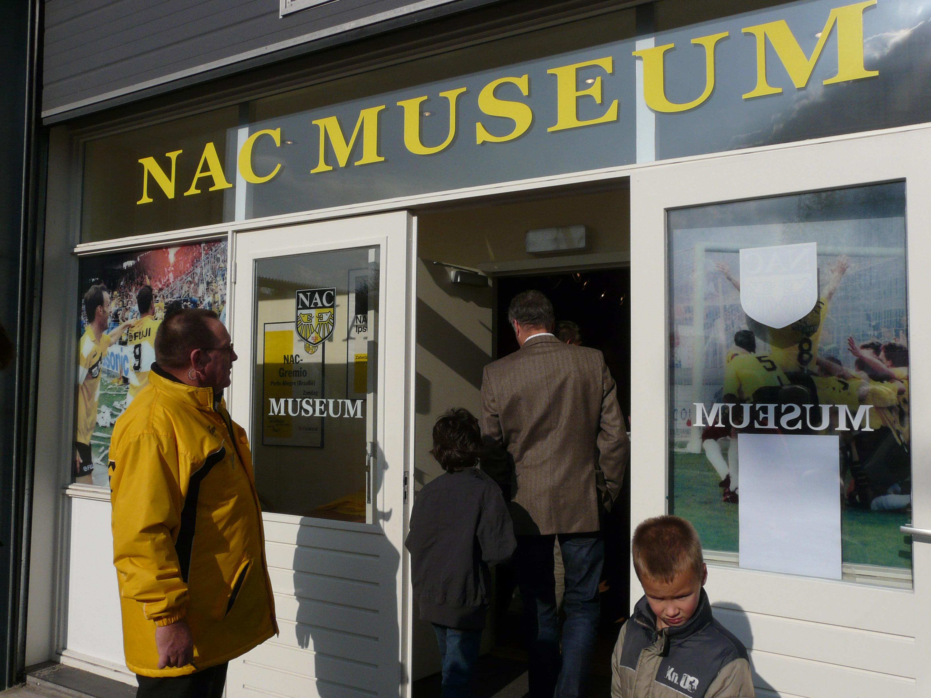 NAC Museum in het stadion van NAC Breda